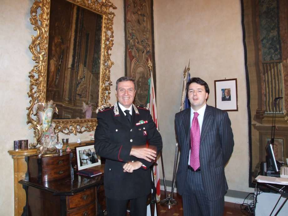 RENZI INCONTRA IL GENERALE ZOTTIN: “COLLABORAZIONE PER LE SCUOLE” Colloquio in Palazzo Medici Riccardi Il Presidente della Provincia di Firenze Matteo Renzi ha accolto stamani in Palazzo Medici Riccardi il nuovo Comandante della Regione Carabinieri Toscana, Generale di brigata Ugo Zottin. Il Generale Zottin, nato nel 1950, è stato tra l’altro alla guida del Comando Carabinieri Tutela del patrimonio culturale. Durante l’incontro sono stati toccati alcuni aspetti dell’attività della Provincia e del Comando dei Carabinieri. Il Presidente Matteo Renzi ha proposto al Generale Zottin di intensificare i rapporti con la Provincia relativamente al controllo delle scuole.